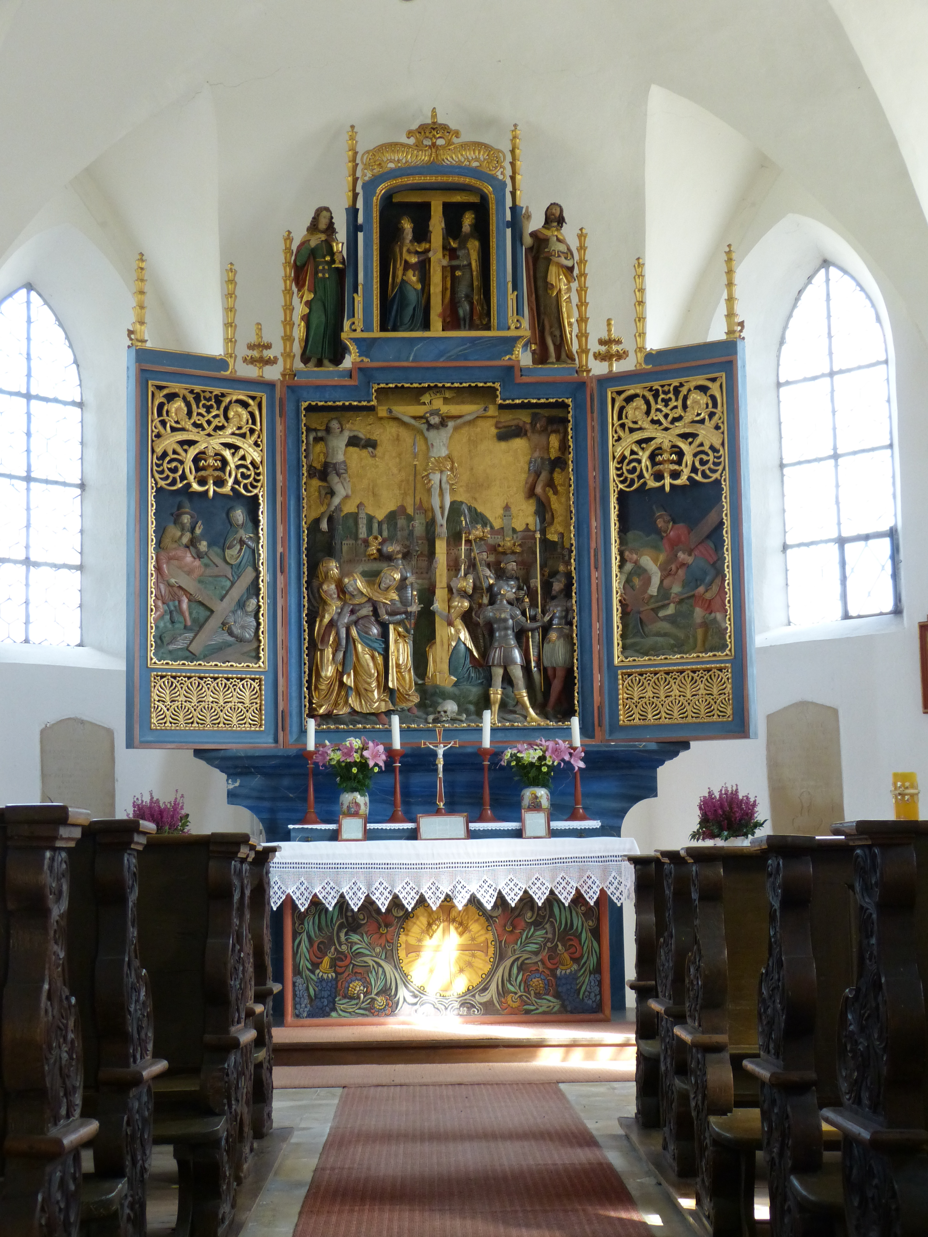 St. Martin in Unterwesterheim, Landkreis Unterallgäu, Bayern